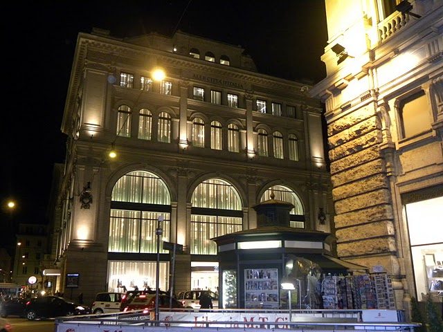 Roma